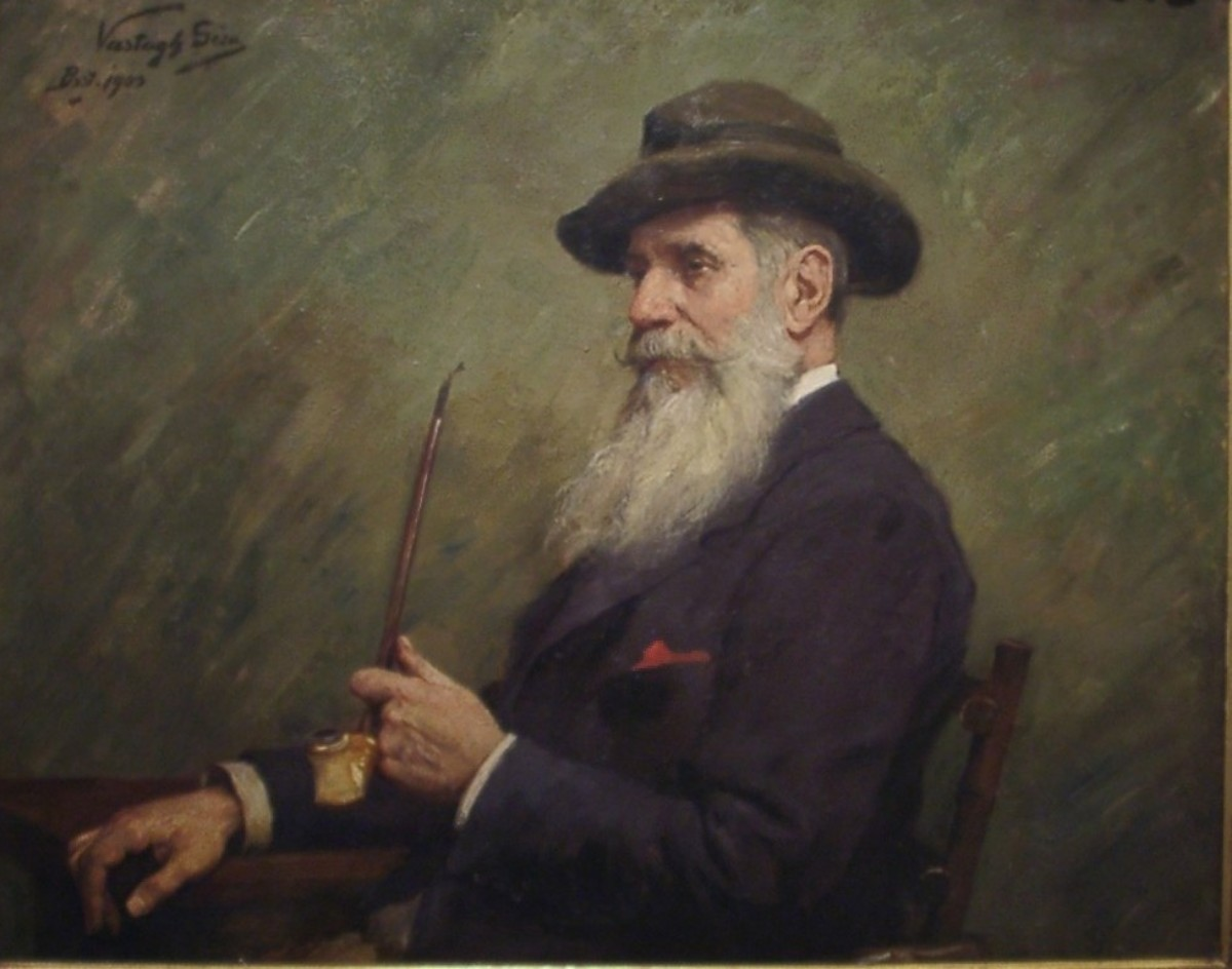 Vastagh Géza: id. Vastagh György portréja